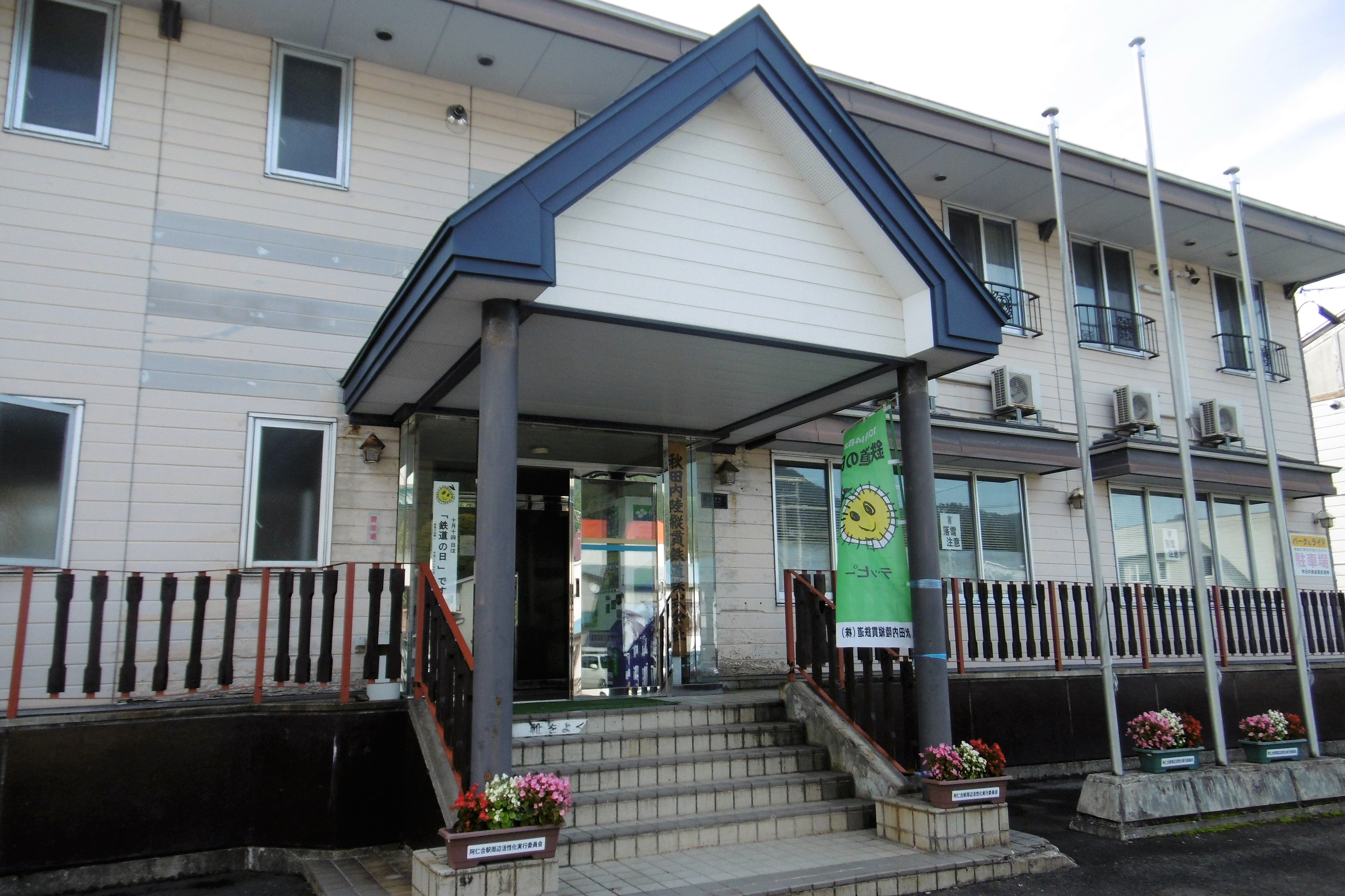 秋田内陸縦貫鉄道株式会社 本社：秋田県北秋田市阿仁銀山字下新町